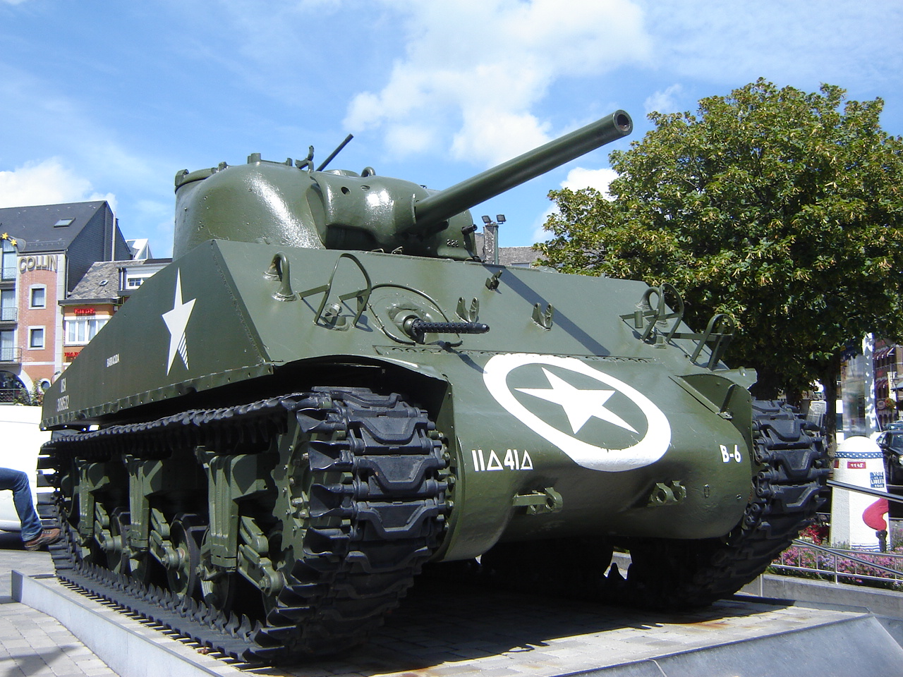 Op Place General McAuliffe staat het meest gefotografeerde object van Bastogne, een Shermantank.